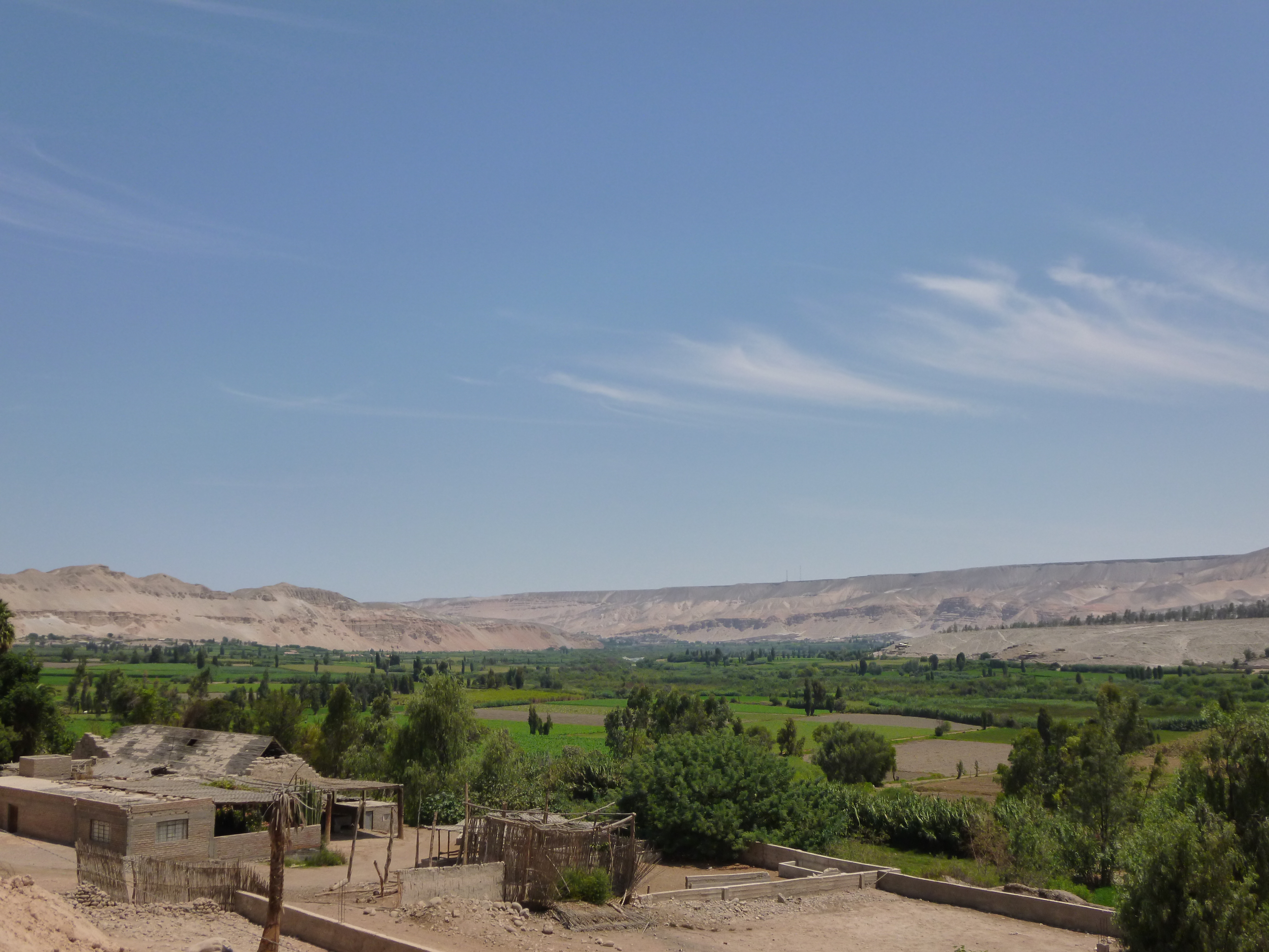 Vista del Valle de Vítor vista desde la Formación Sotillo.